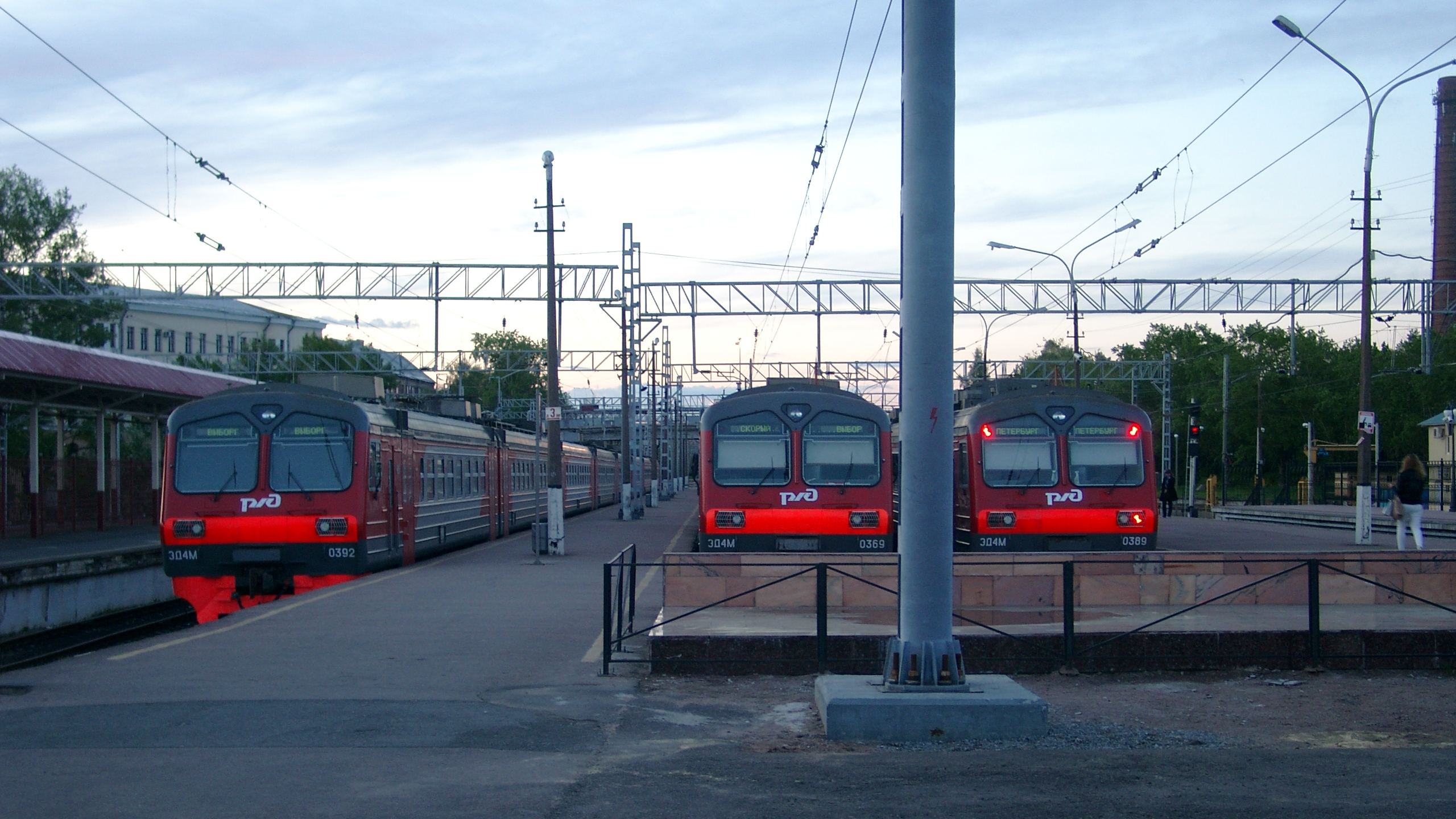 Железнодорожная станция Выборг, Ленинградская область, Россия. Пригородные электропоезда ЭД4М у платформ № 2 и 3.